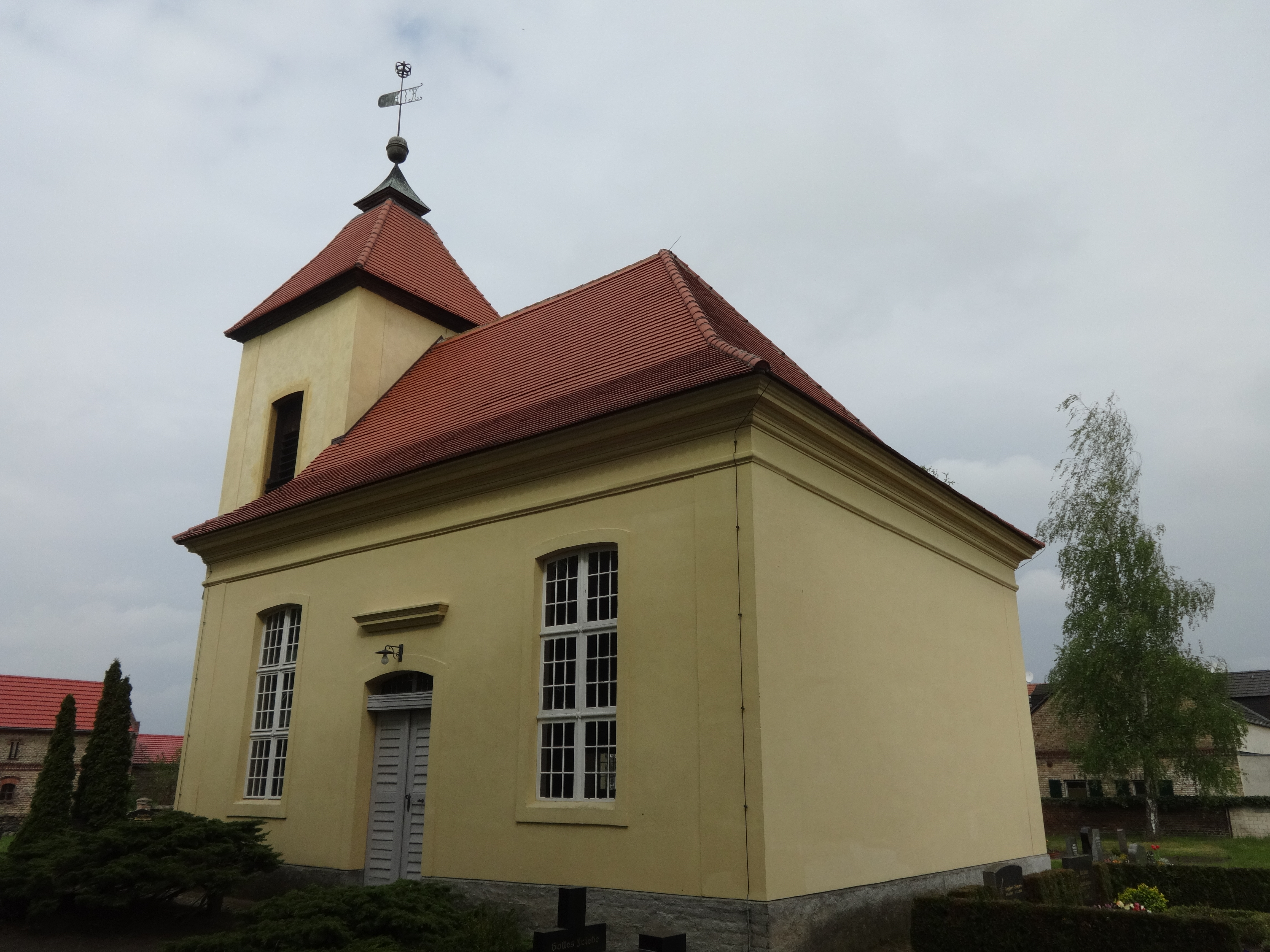 Dorfkirche Nudow, eine der wenigen Kronkirchen in Brandenburg aus dem 18. Jahrhundert. Gemeinde Nuthetal, Landkreis Potsdam-Mittelmark.